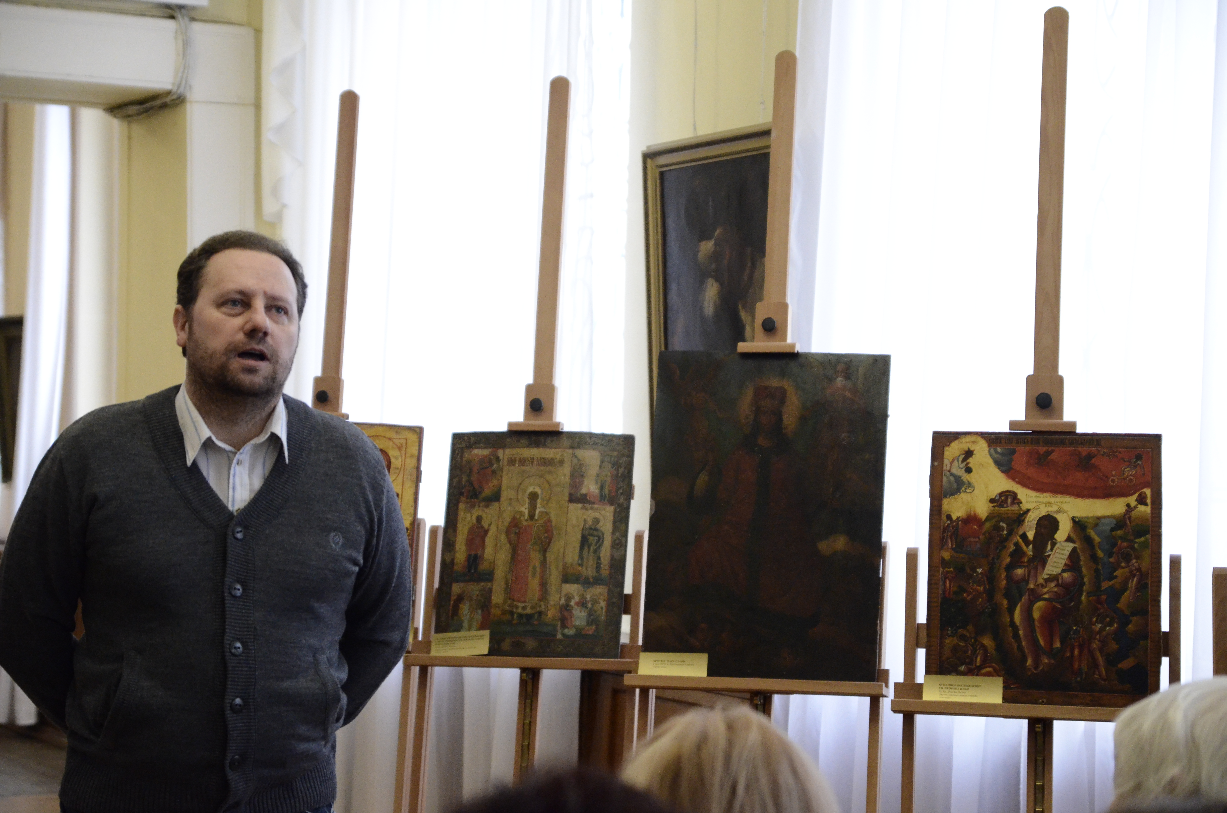 Презентация каталога «100 икон» в Донецком областном художественном музее